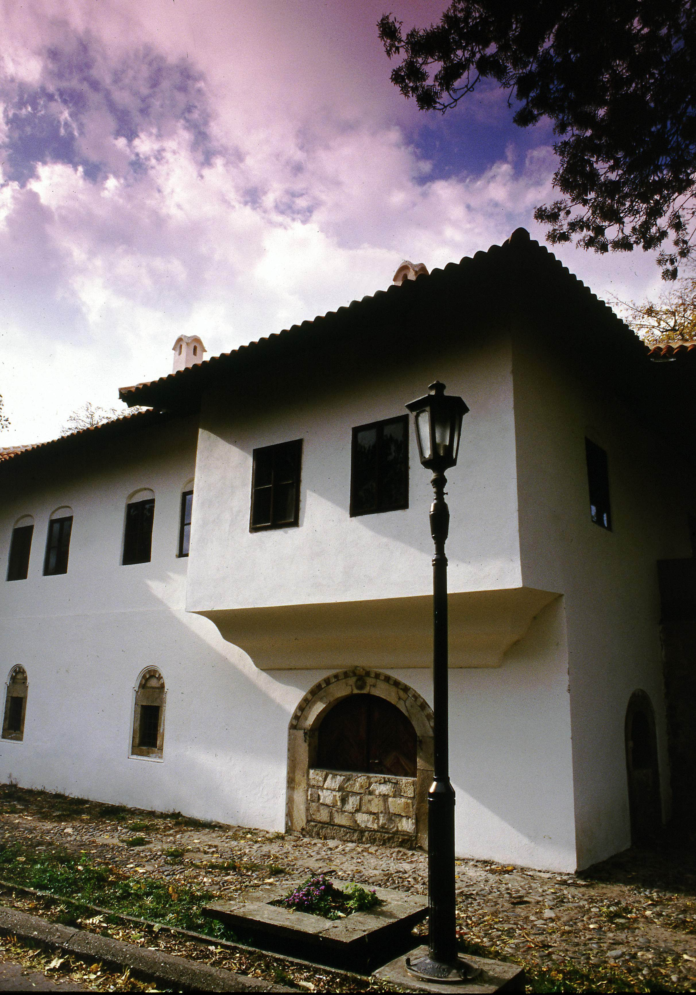 Konak Amidža in Kragujevac, Serbia/La Résidence Amidža à Kragujevac, Serbie